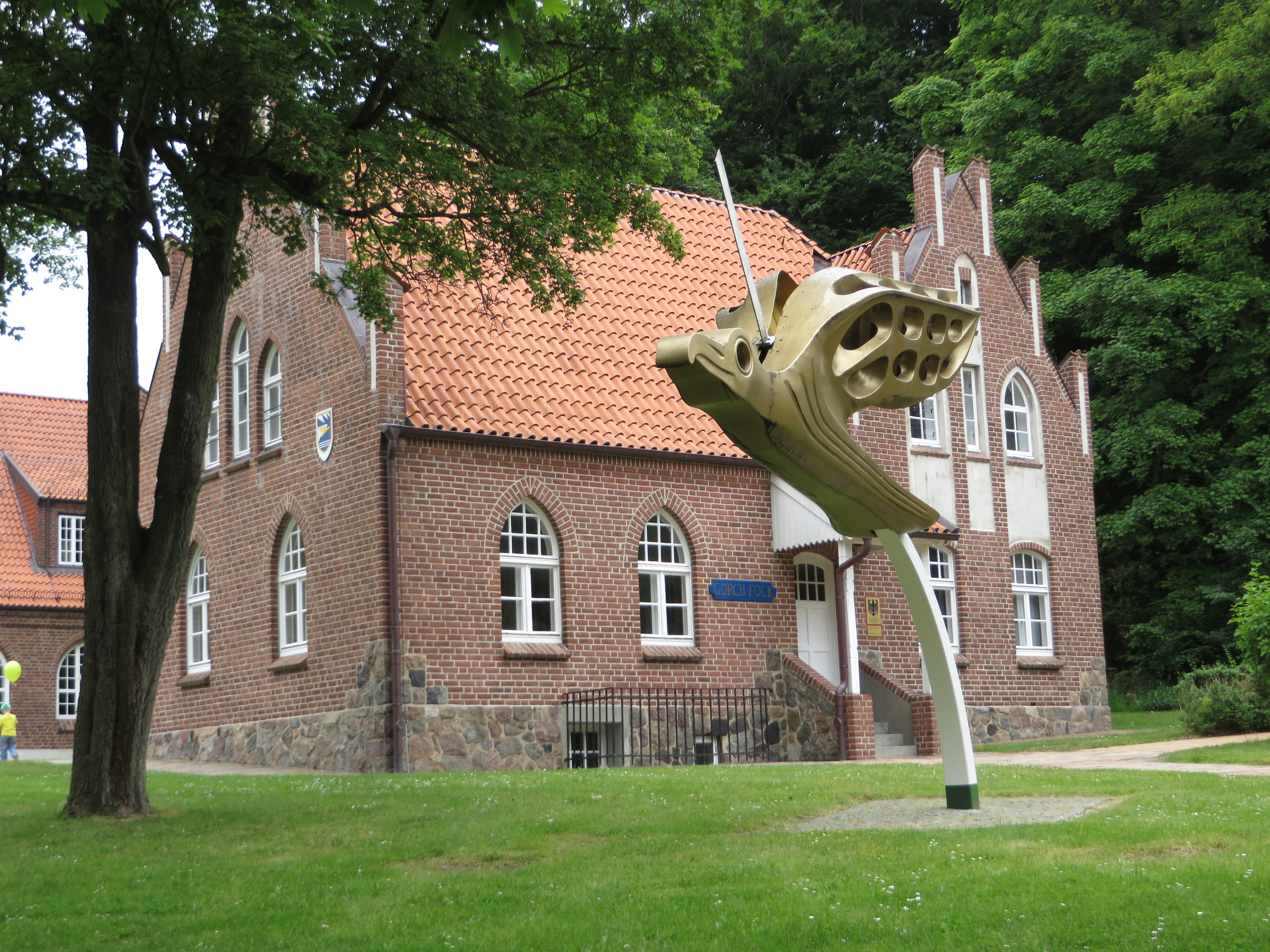 Galionsfigur der Gorch Fock vor dem Gorch-Fock-Haus (Flensburg-Mürwik Juni 2015), Bild 02